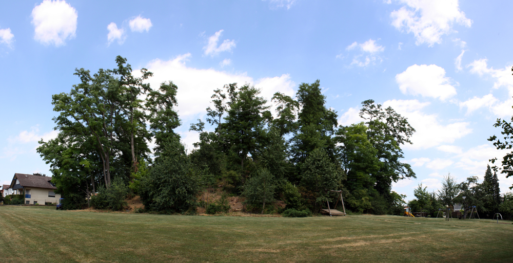 Blick auf den Melbacher Haag